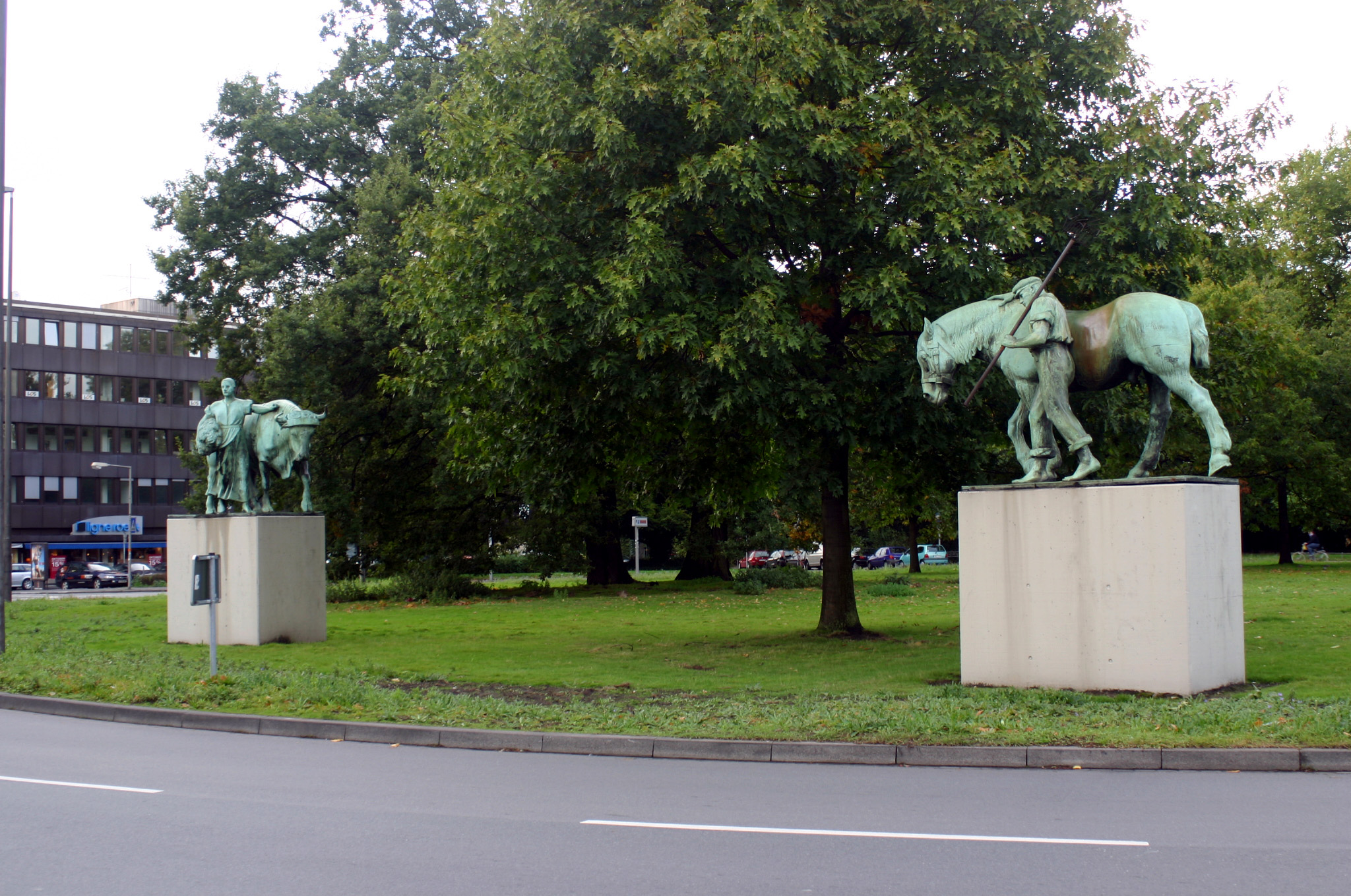 Münster, Germany, Ludgeriplatz - Ochse und Pferd: Bronzeskulpturen „Knecht mit Pferd“ und „Magd mit Stier“ Skulptur.Projekte 1987